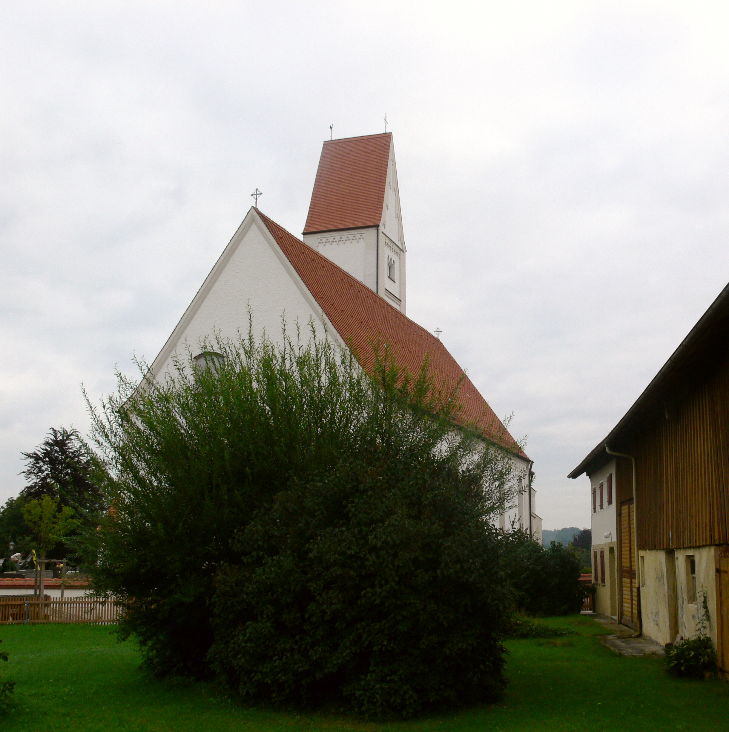 Pfarrkirche in Sontheim, Landkreis Unterallgäu